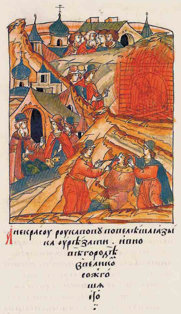 Казни еретиков жидовствующих в 1504 году. Лицевой летописный свод 18 том страница 48. “ А҆ некра́сѹ рѹкавовꙋ повелѣ́ша ꙗ҆зы́ка ѹ҆рѣ́заᲅи. и҆ вновѣ̀городѣ̀ в̾великоⷨ сож̾го́шѧ его.А Некрасу Рукавову повелели язык вырвать и сожгли его в Великом Новегороде. ”